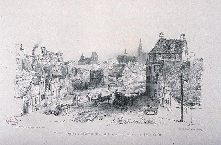 Vue de l'ancien marais vert prise sur le rempart à l'entrée du Chemin de fer. Bibliothèque nationale et universitaire de Strasbourg